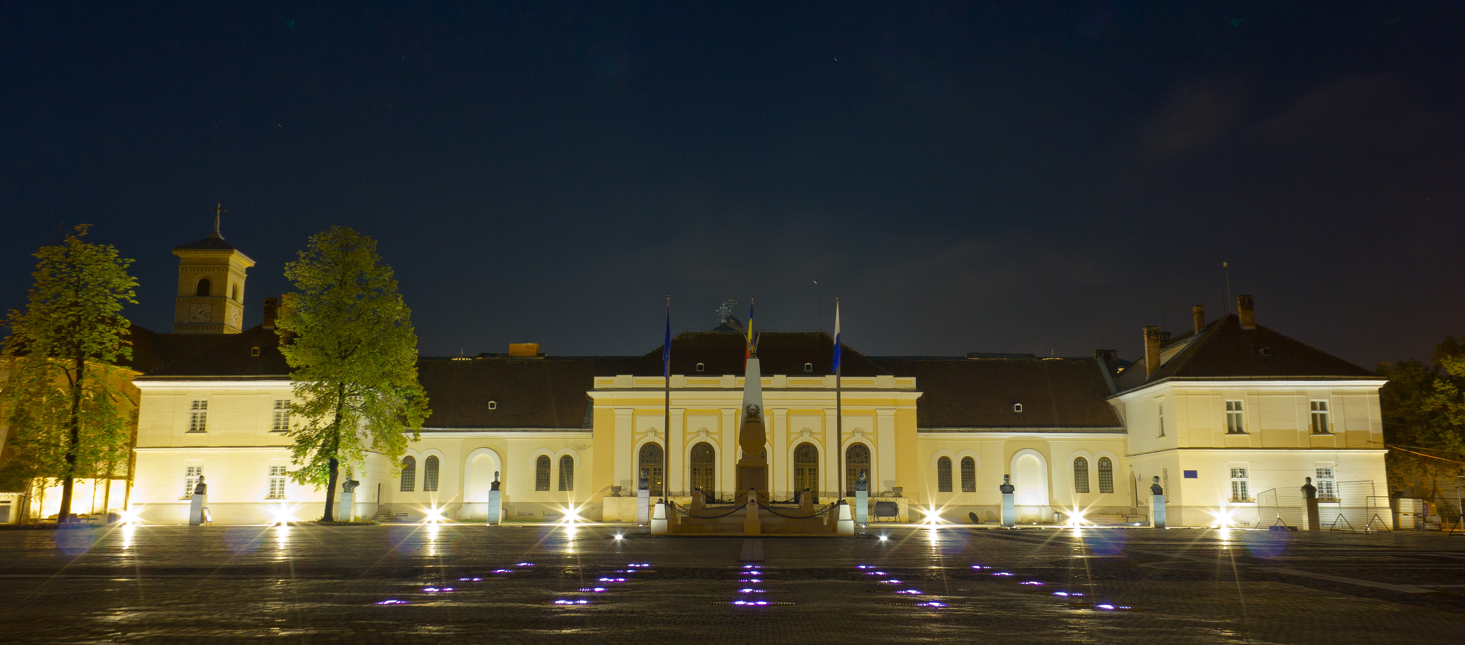 Vedere Sala Unirii dinspre Parcul Custozza, Alba Iulia, România